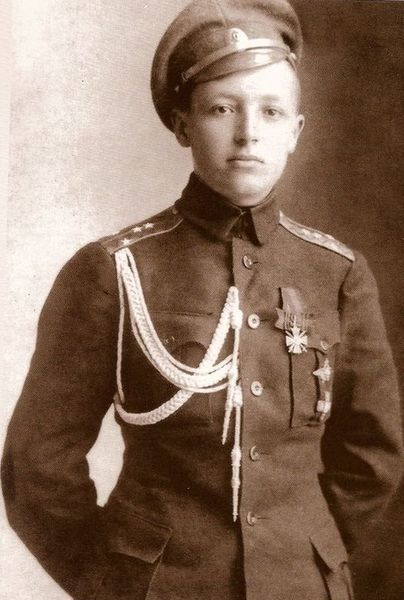 Всеволод Петрович Аглаимов, Штабс-ро́тмистр 12-го гусарского Ахтырского полка, участник Белого движения